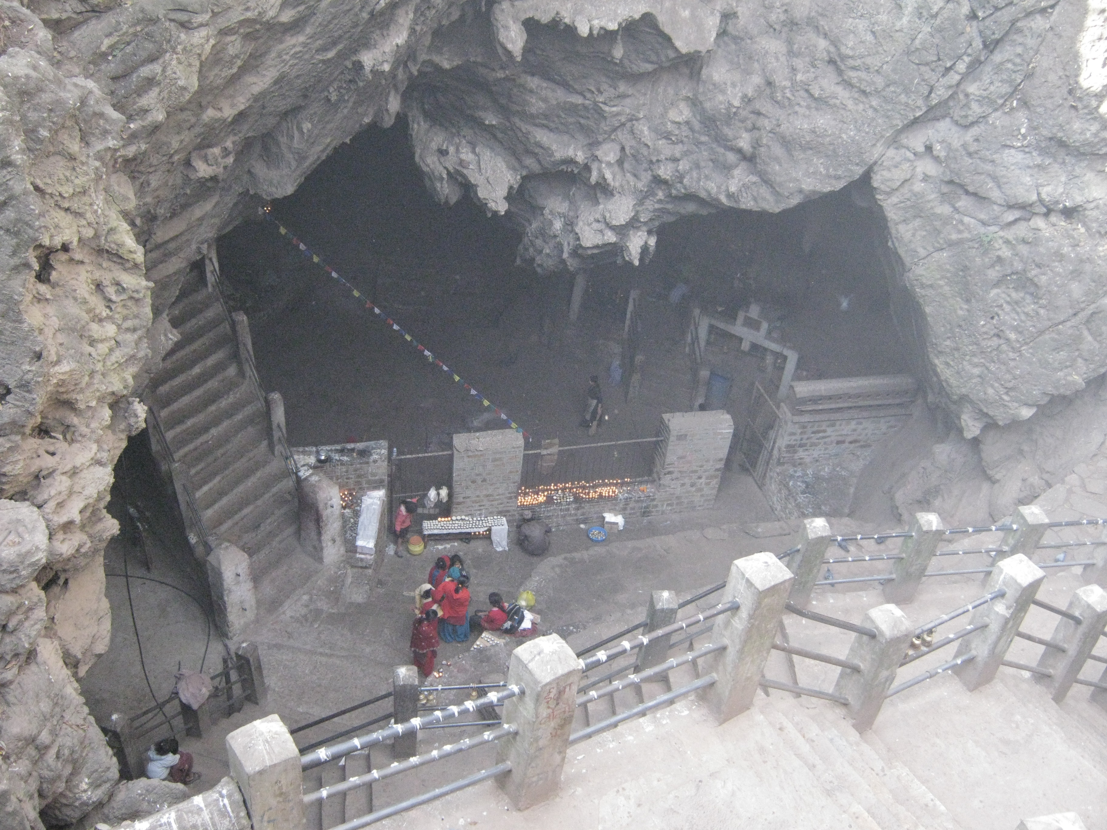 नेपाली: हलेसी महादेव गुफा